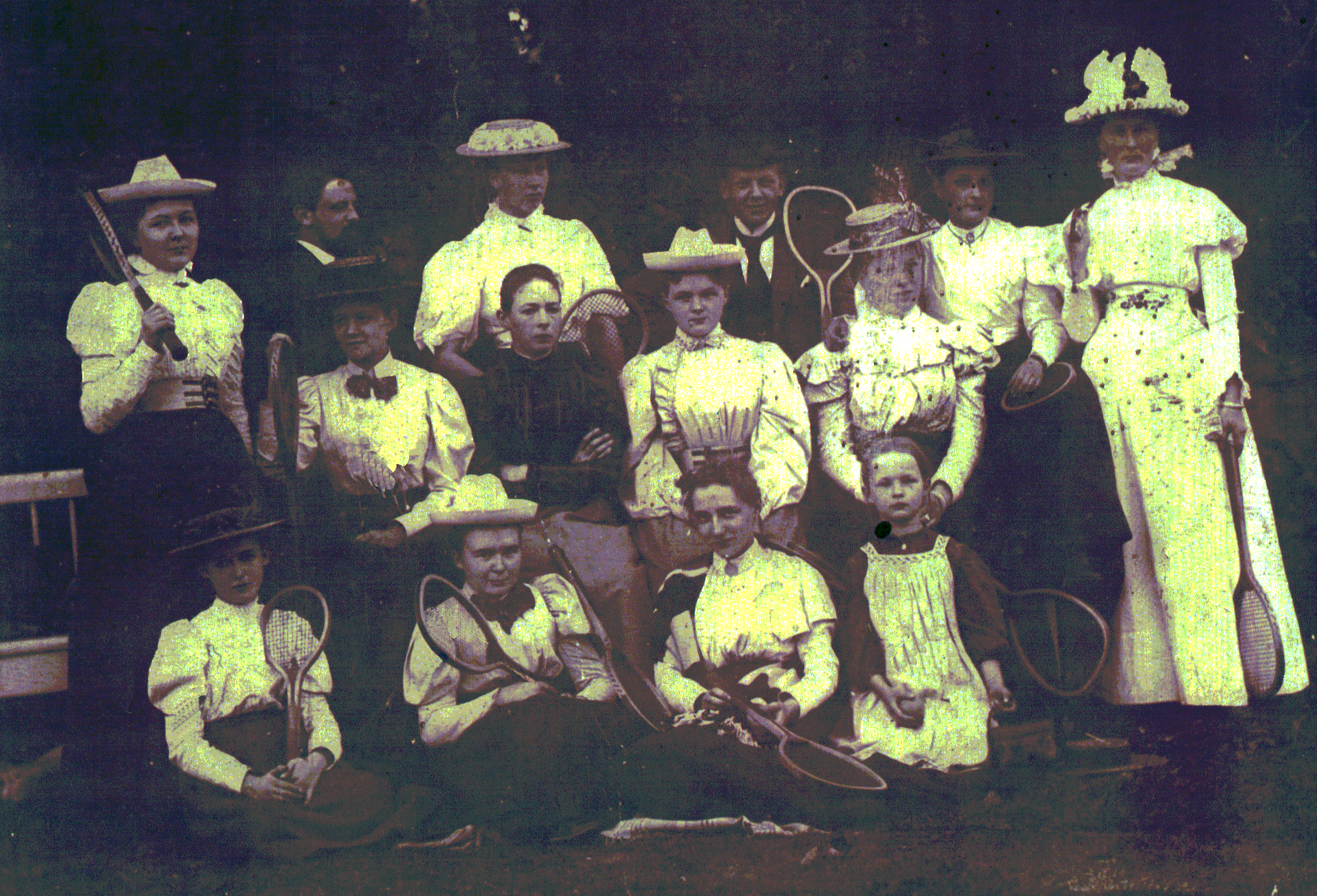 Verwandte der Klosterdamen beim Tennis im Klosterpark Dobbertin